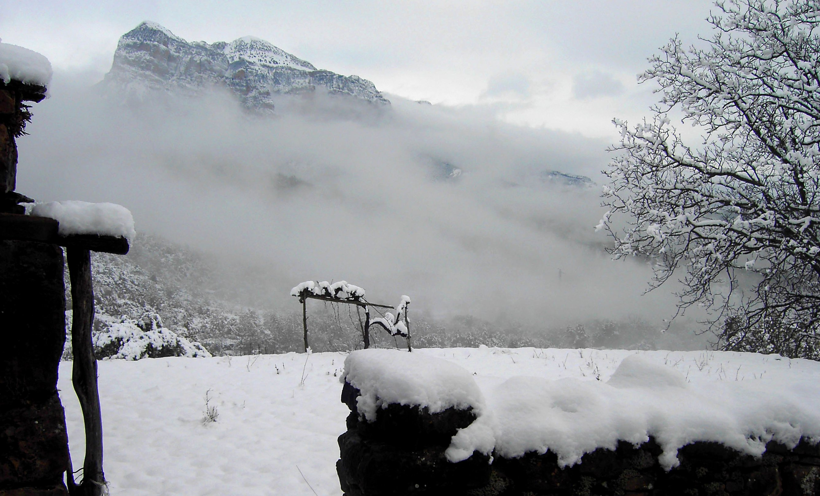 Aragonés: Nevazo en a valle d'a Cinca, dende Sant Vicient d'A Buerda.